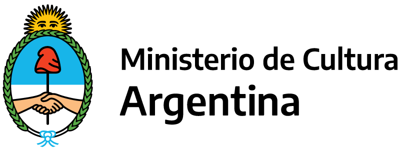 Logo Ministerio de Cultura